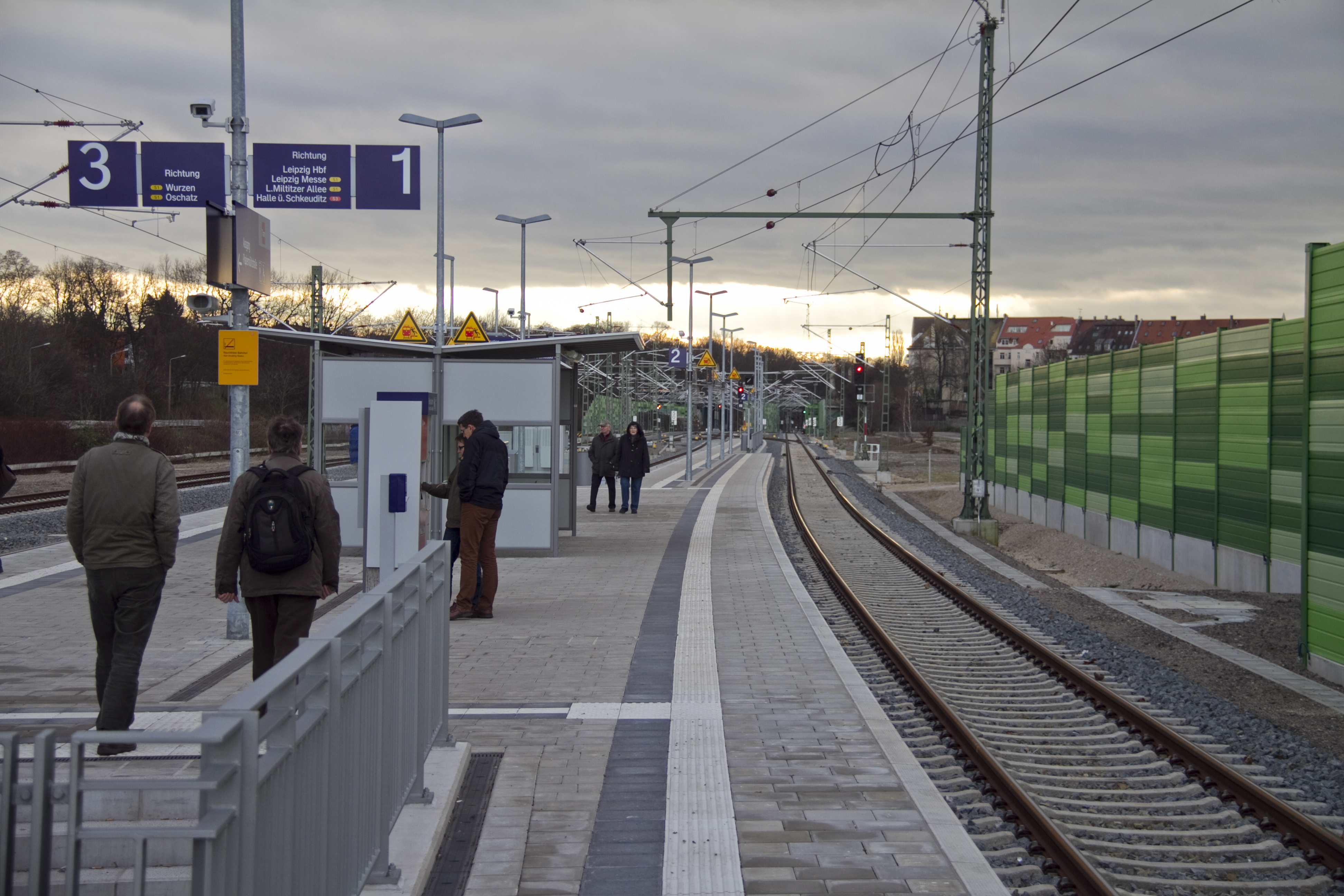 Neuer Bahnsteig in Stötteritz nach Inbetriebnahme der S-Bahn Mitteldeutschland